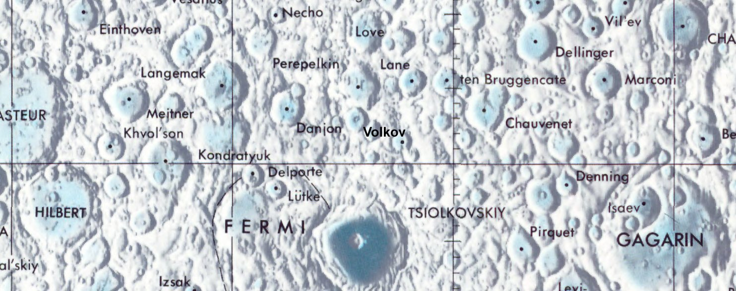 Cráter lunar Volkov. Localización. (Lunar Chart LPC1. Second Edition)